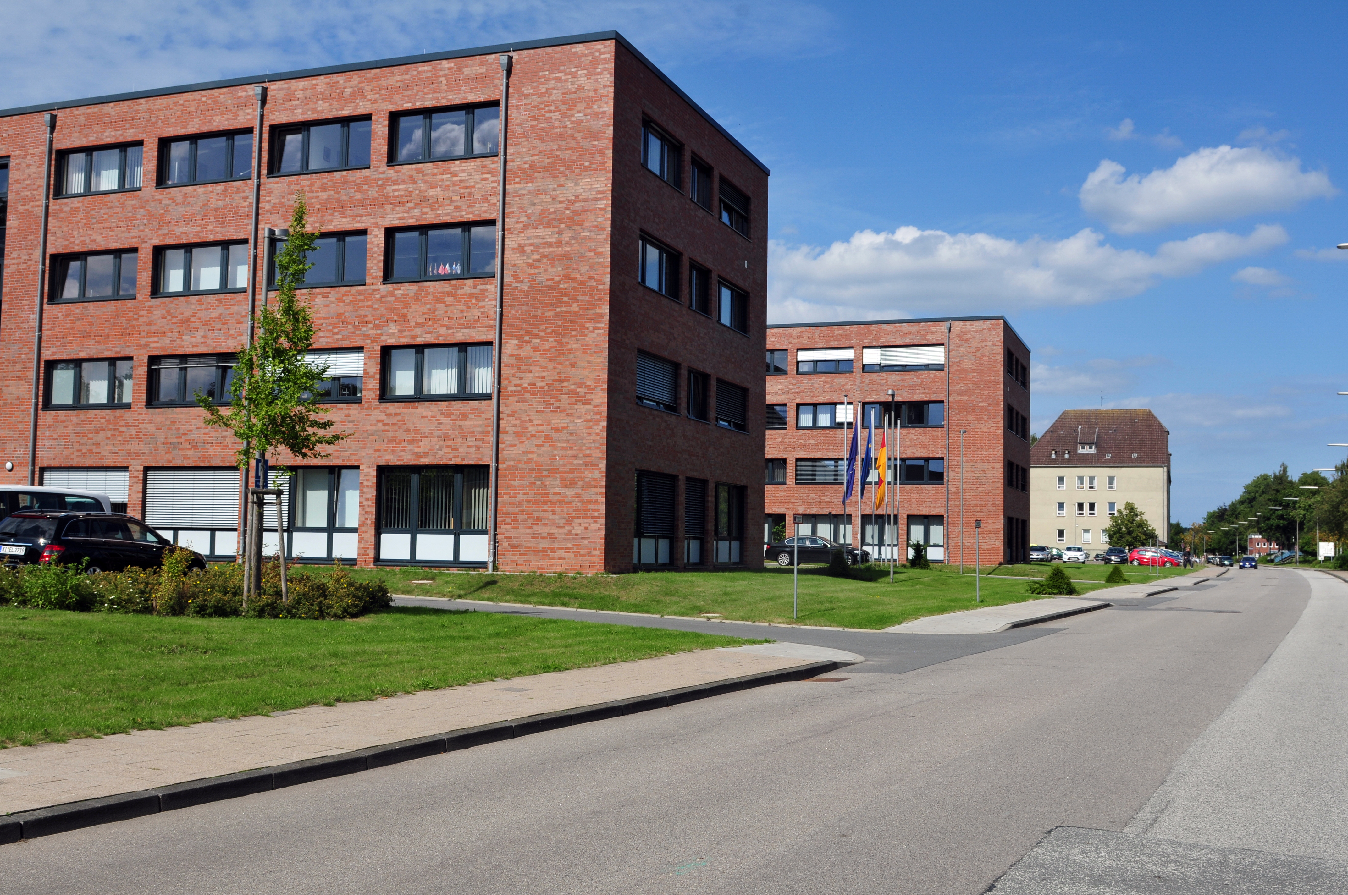 Landtagsprojekt Schleswig-Holstein; Marinestützpunktkommando Kiel